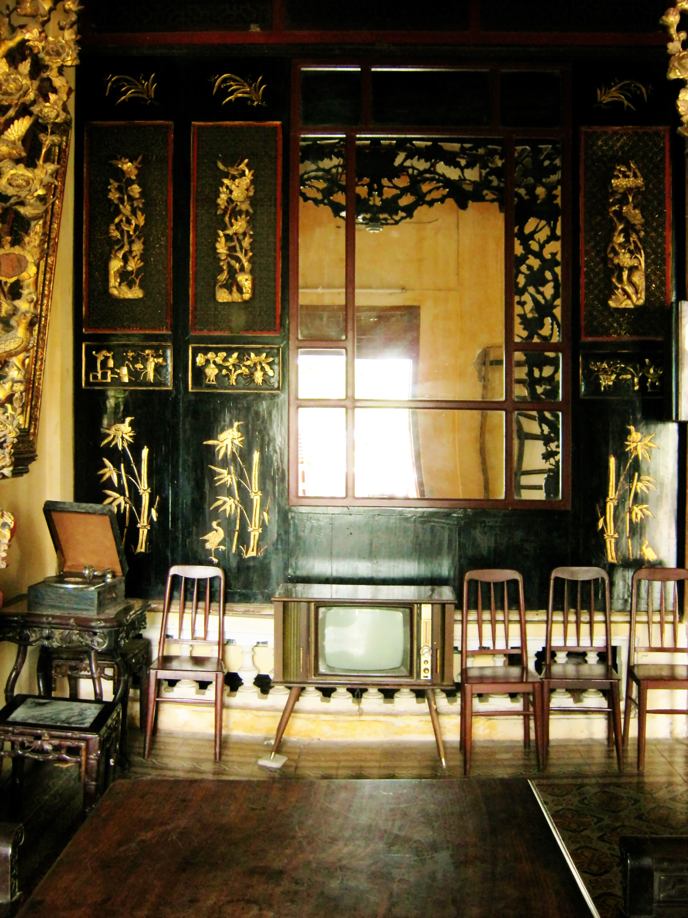 Vật dụng trong Nhà Cổ Huỳnh Thủy Lê ở thị xã Sa Đéc, tỉnh Đồng Tháp, Việt Nam.